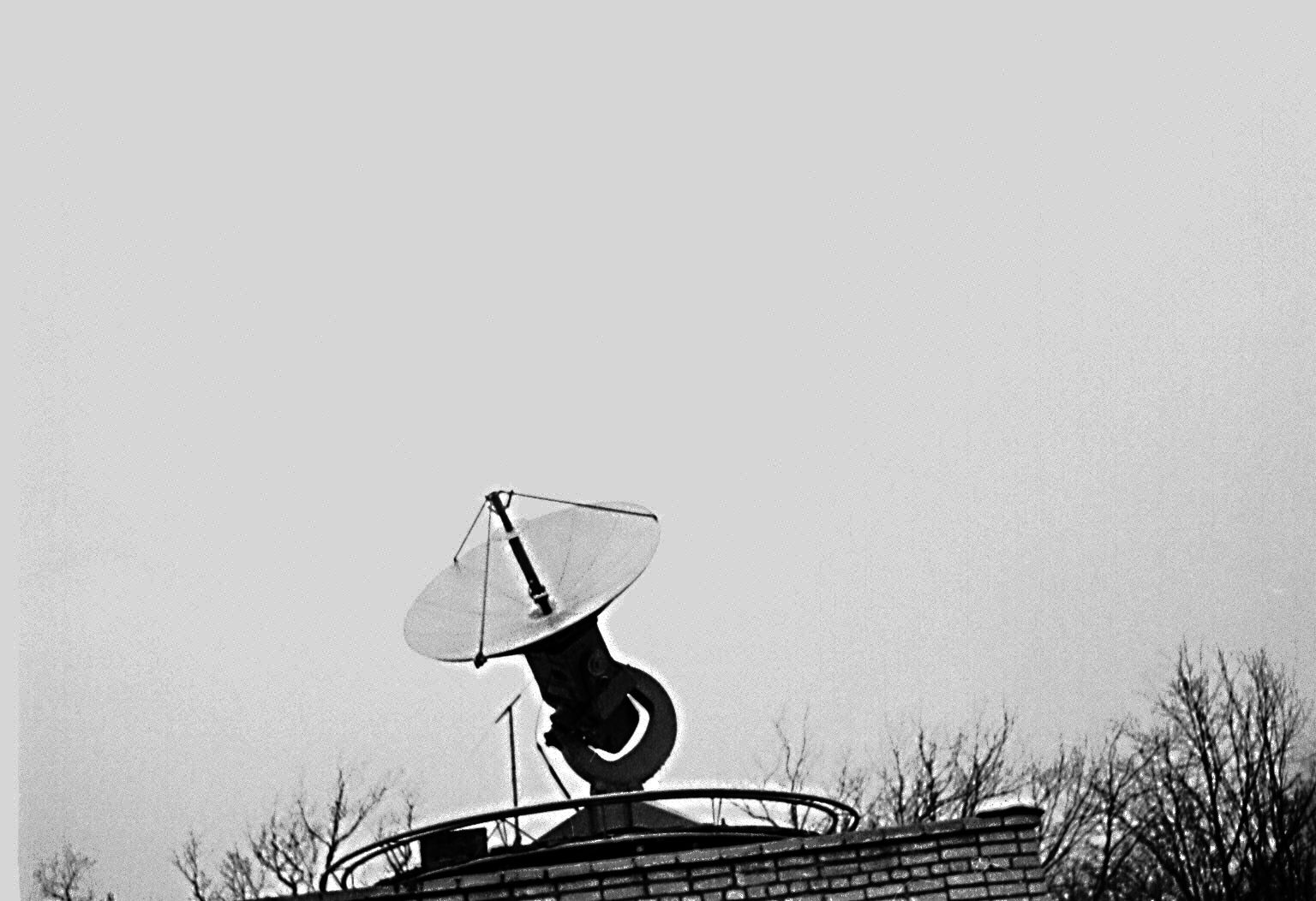 Уссурийск Служба Солнца 1978 год